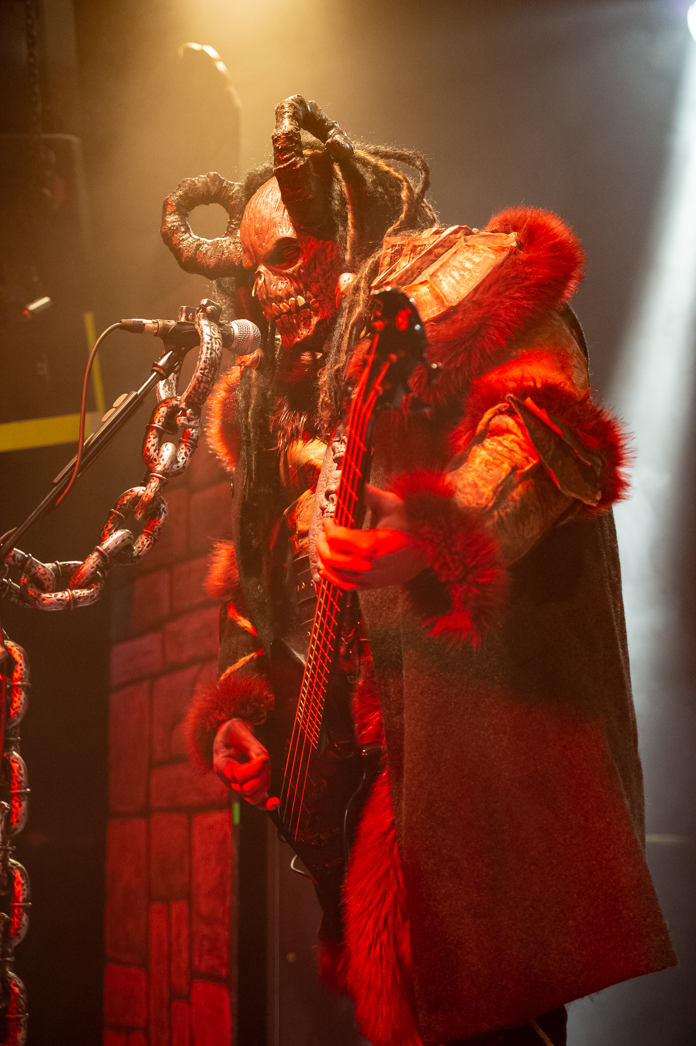 Concertbüro Franken,Der Hirsch,Konzert,Livekonzert,Livemusik,Lordi,Musik,OX,Samer el Nahhal